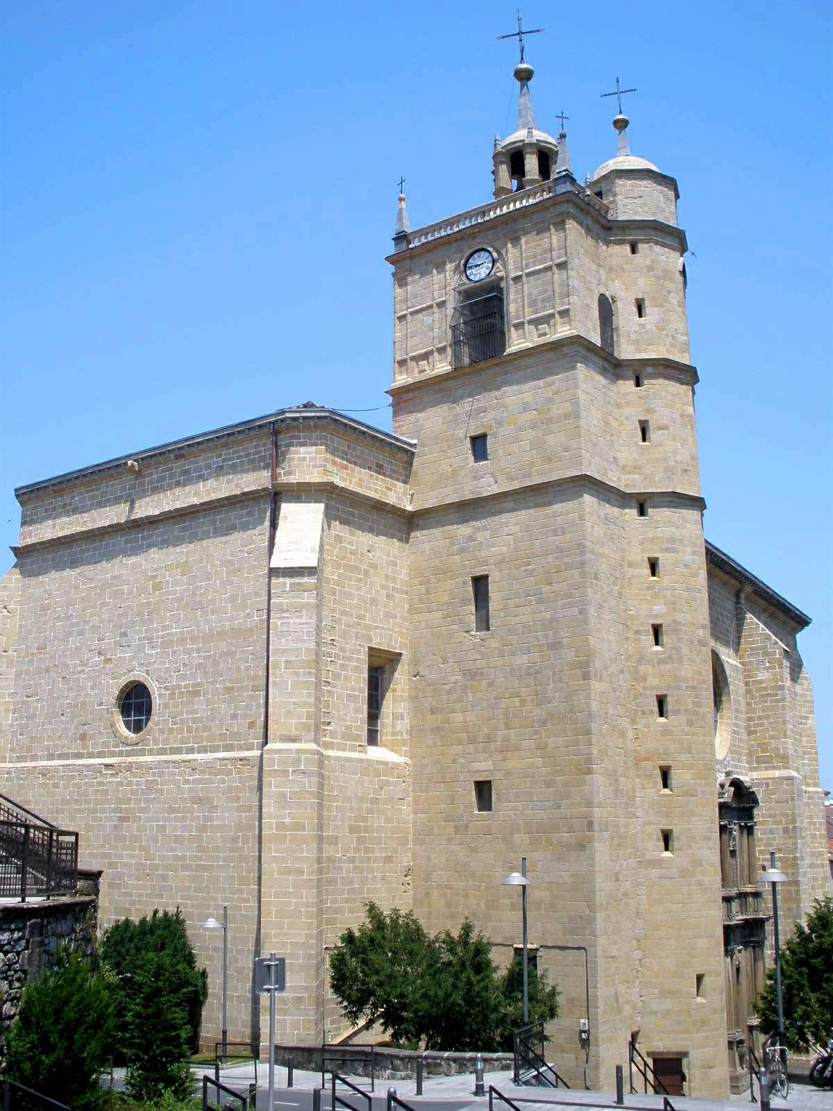 Iglesia de Nuestra Señora del Juncal, Irún (Guipúzcoa)